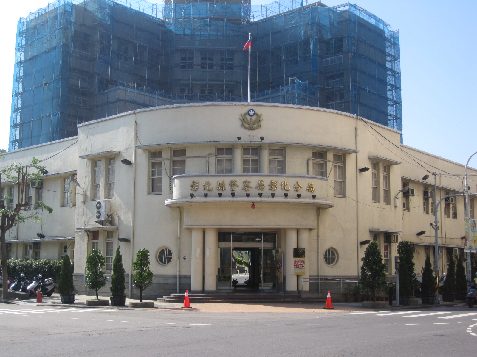 彰化縣警察局彰化分局，地址：彰化縣彰化市民生路234號（原彰化警察署）。